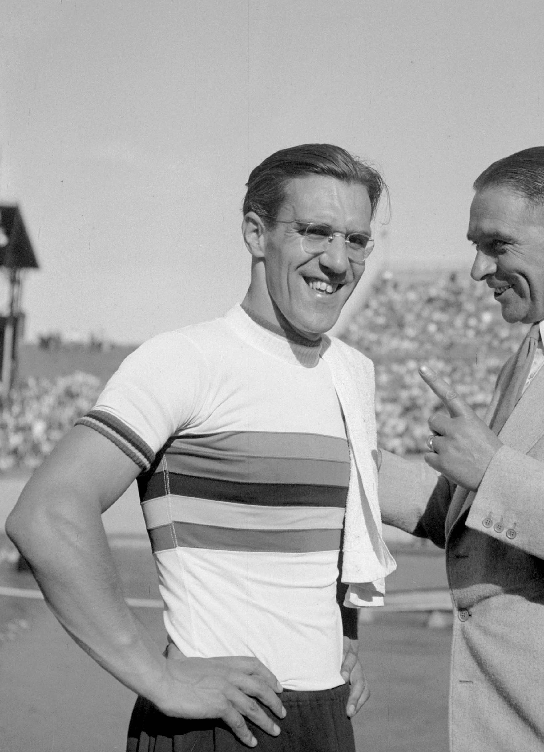 Wereldkampioenschappen op de baan Arie Van Vliet in gesprek